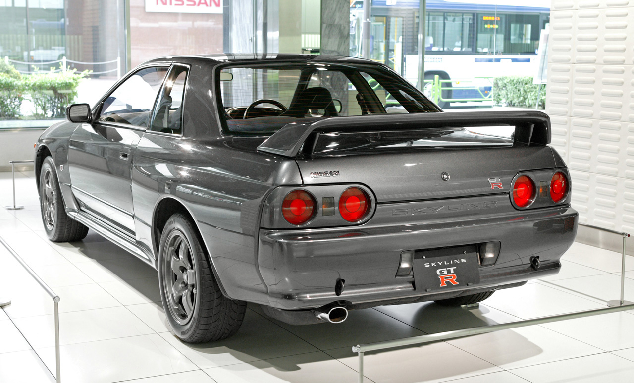 Nissan Skyline R32 GT-R, in Nissan Ginza Gallery.